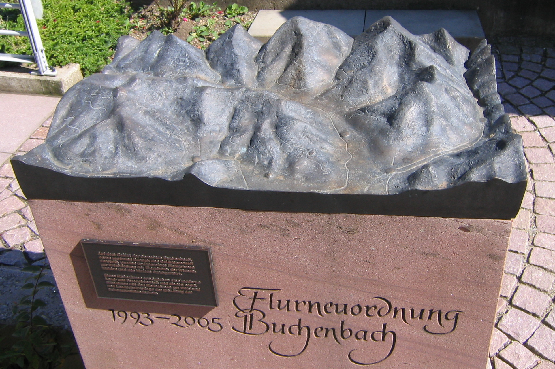 Relief der Flurneuordnung in Buchenbach